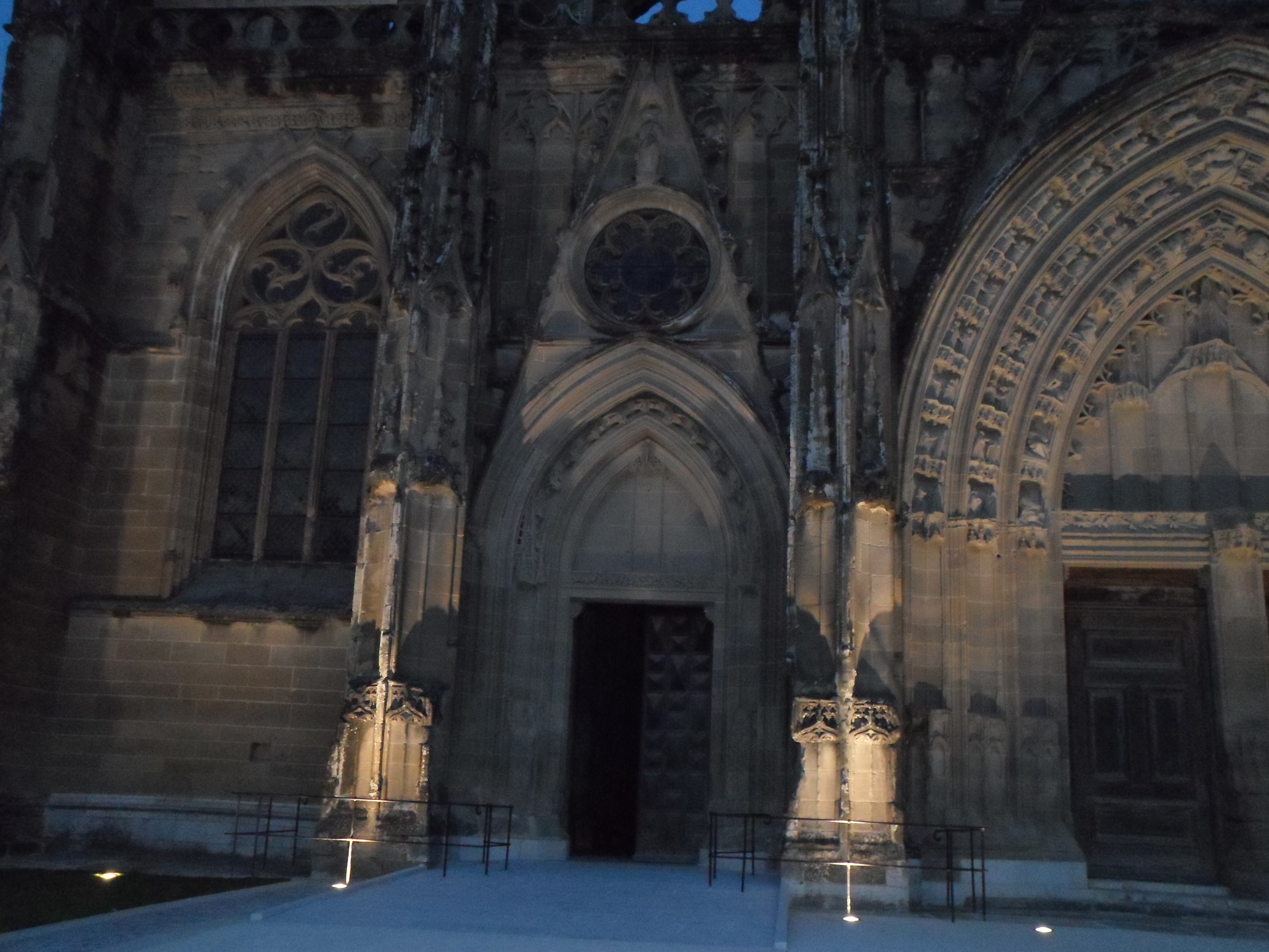 Église Notre-Dame de la Jayère Eglise Saint-Antoine-l'Abbaye by night 38160 PA38000020 VAN DEN HENDE ALAIN CC -BY-SA 4 0 050139 .